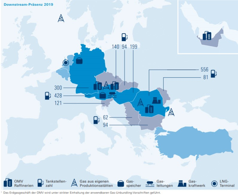 Die Präsenz der OMV in den verschiedenen Downstream Bereichen 2019.